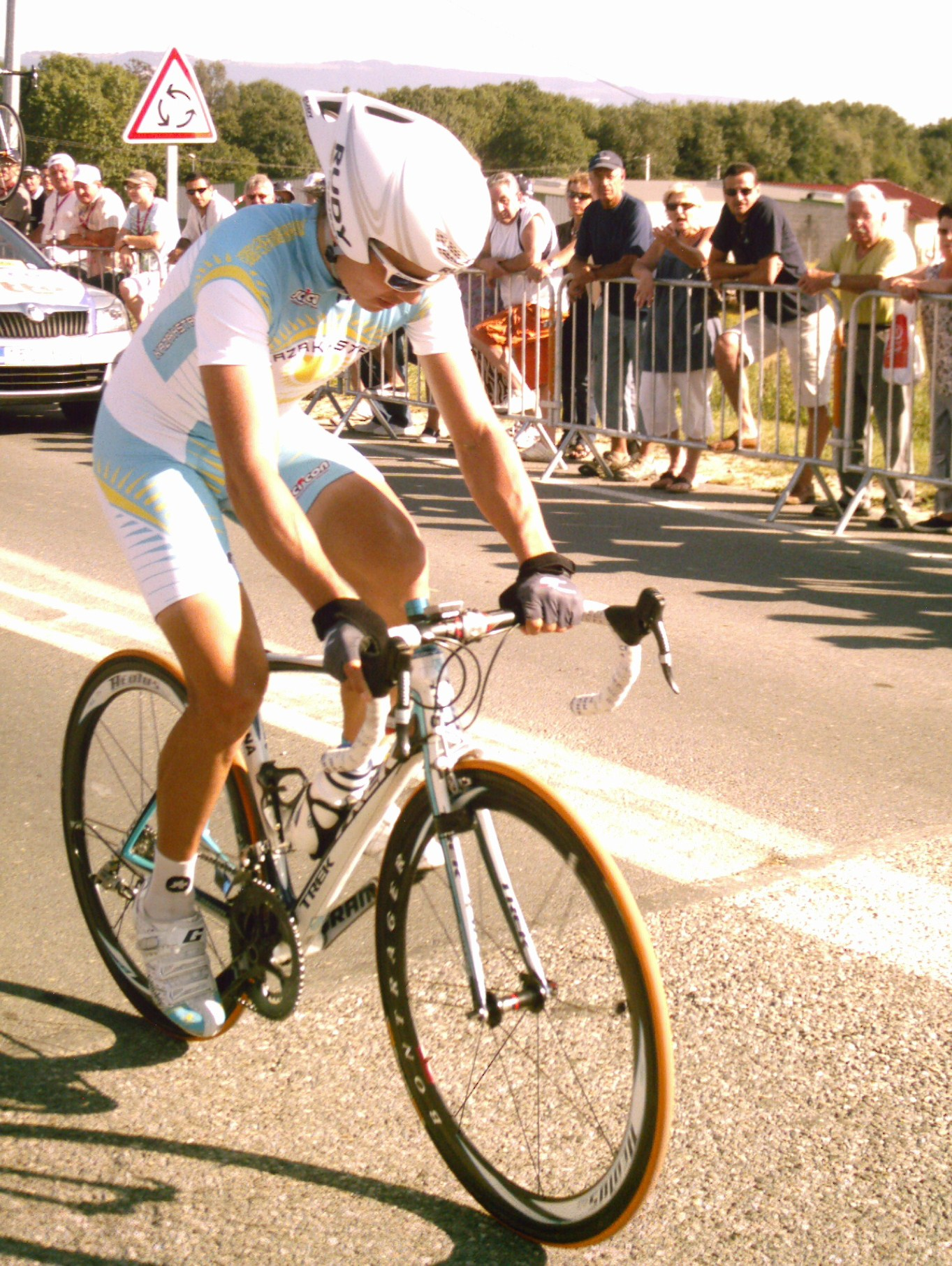 Valentin Iglinskiy au départ du contre-la-montre de la troisième étape b du Tour de l'Ain 2009.